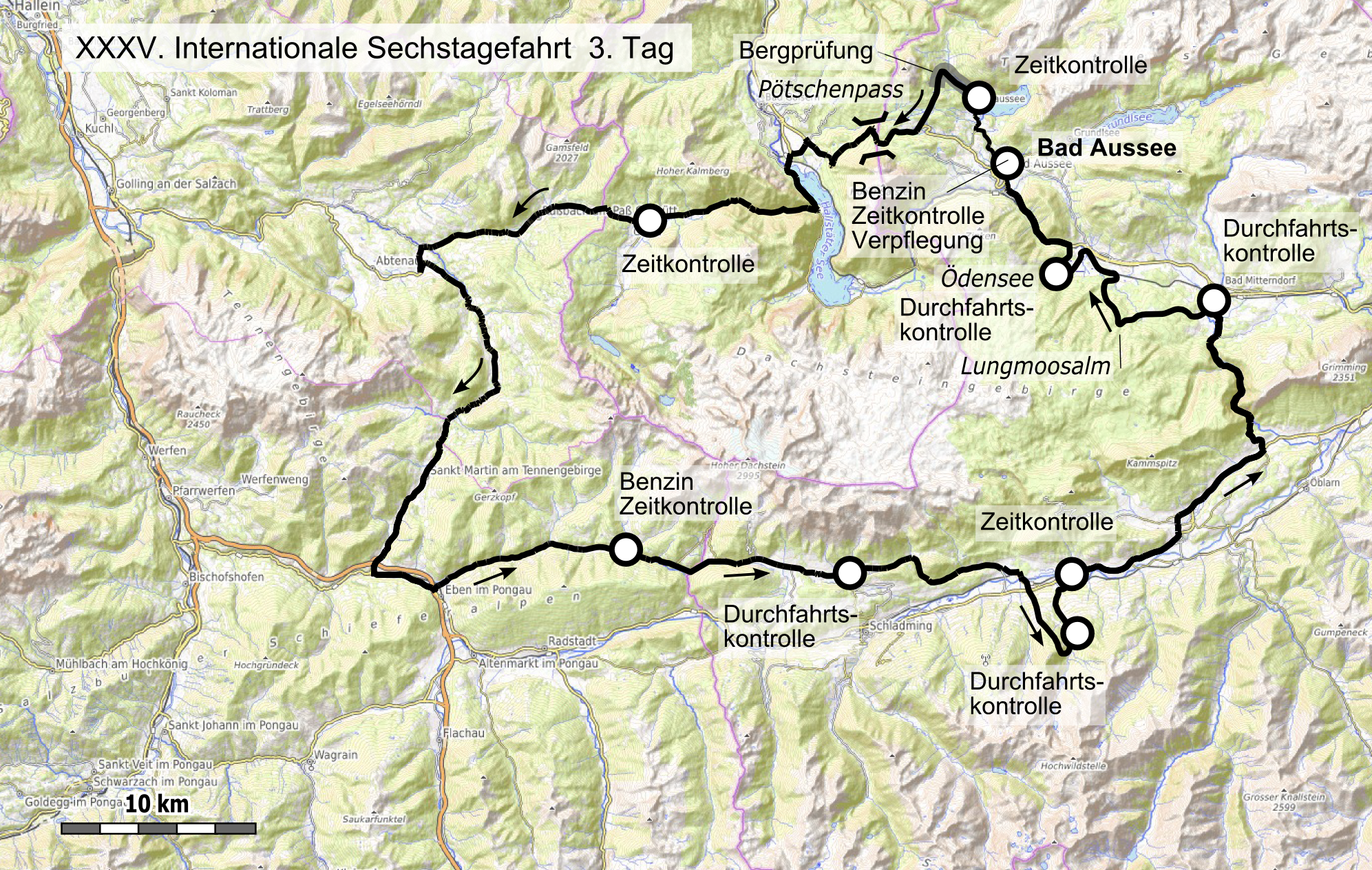 Karte der 35. Internationale Sechstagefahrt, Route des 3. Tages